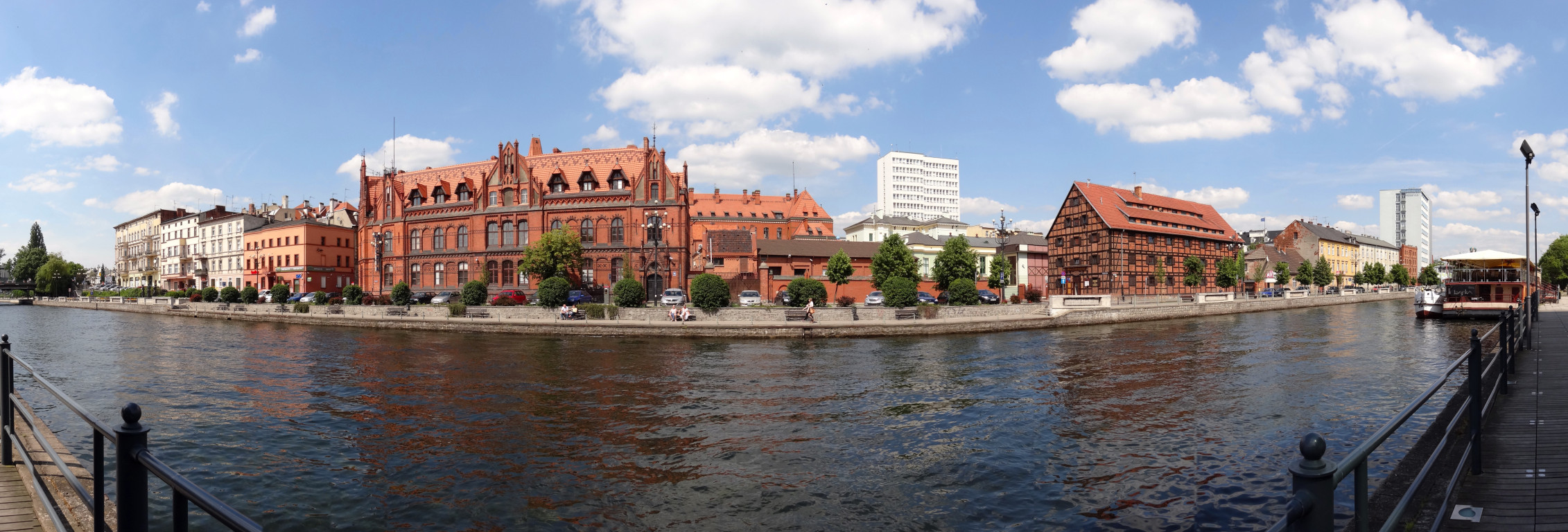 Północne nabrzeże Brdy w centrum Bydgoszczy